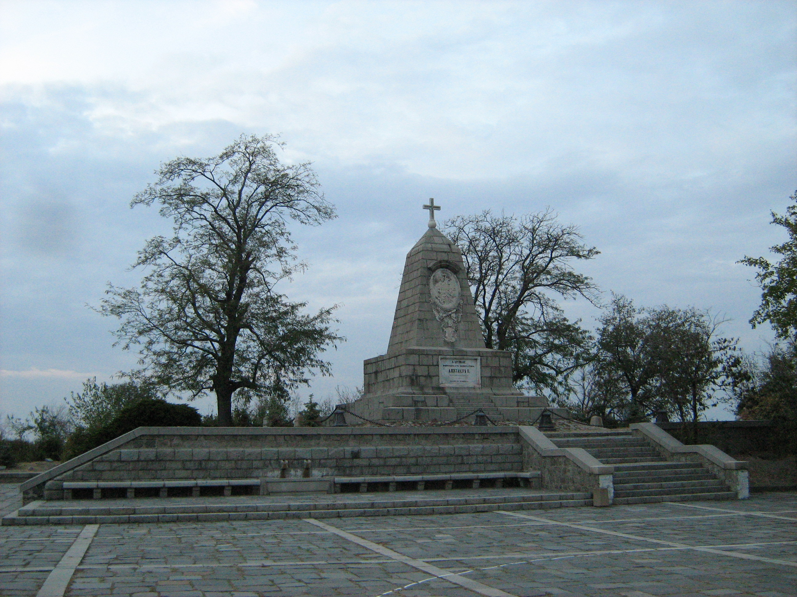 Паметник на Александър II на тепе Бунарджик, гр. Пловдив.